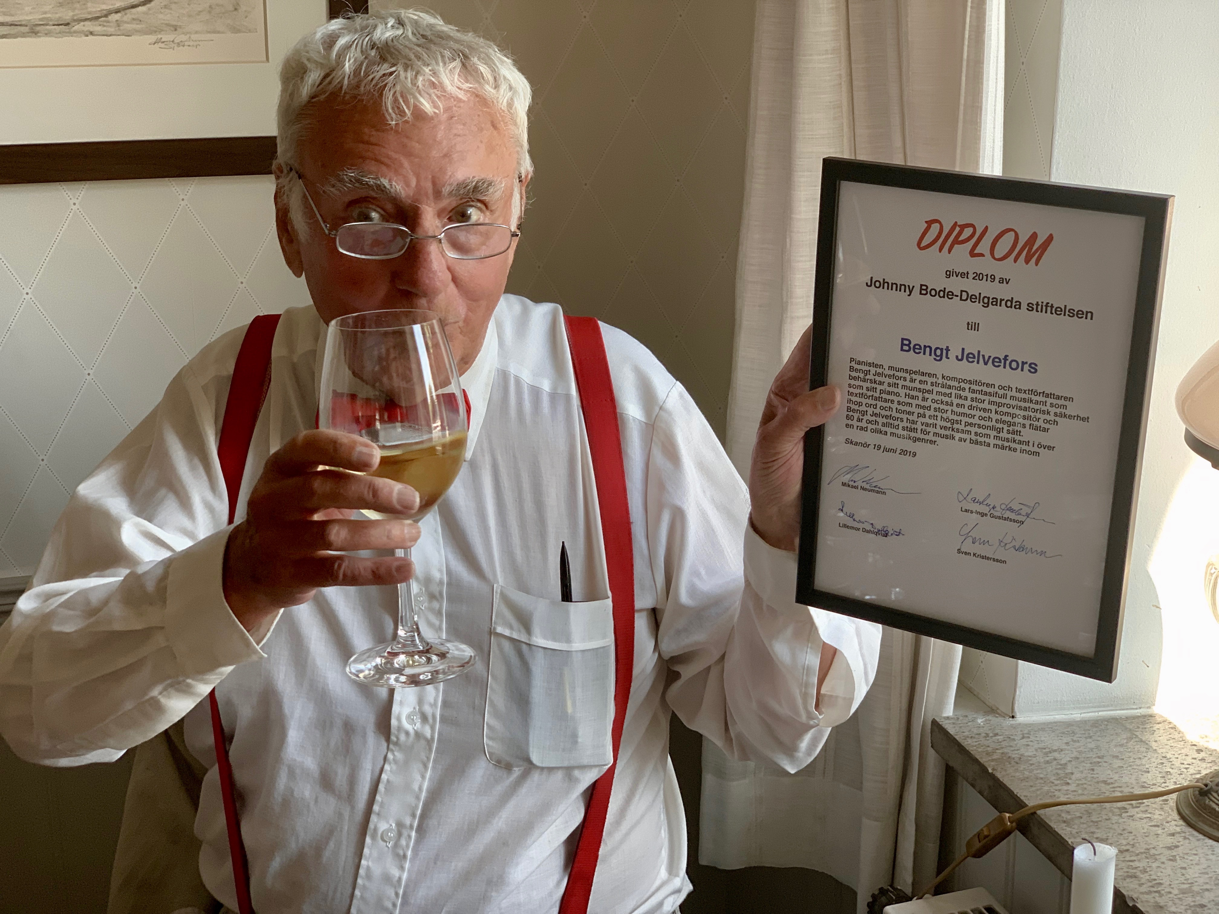 Bengt Jelvefors mottar Johnny Bode stipendiet den 19 juni 2019 på Skanörs gästis